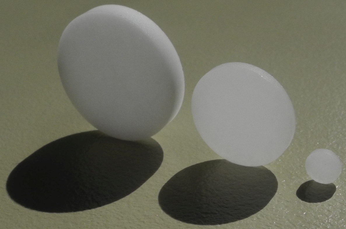 Optische Diffusoren aus Quarzglas mit 3, 1,5 und 1 mm Wandstärke (v.l.n.r.)